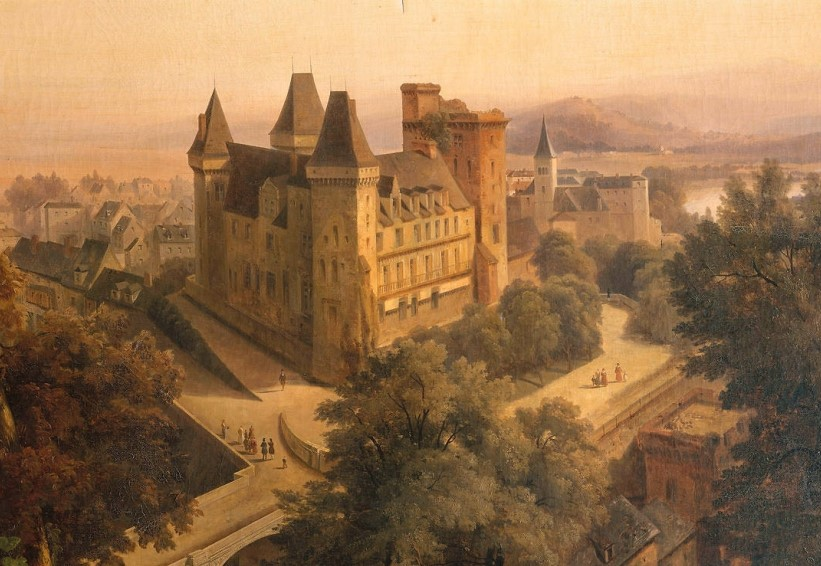 Commandé pour 1500 francs, 8 avril 1843 ; payé 1500 francs, 3 mars 1845 ; collection Louis-Philippe ; envoyé à Versailles, 6 mai 1846 ; mentionné dans la salle des Résidences royales : vues de châteaux (n°157), aile du Midi, attiques, dans l’inventaire de 1850 ; déposé à Pau, musée national du château, 12 mai 1989